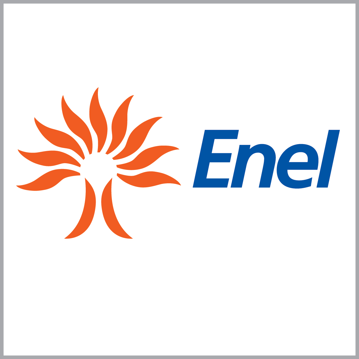 Логотип компании Enel с 1998 по 2006 г., разработанный Bob Noorda в период приватизации компании.